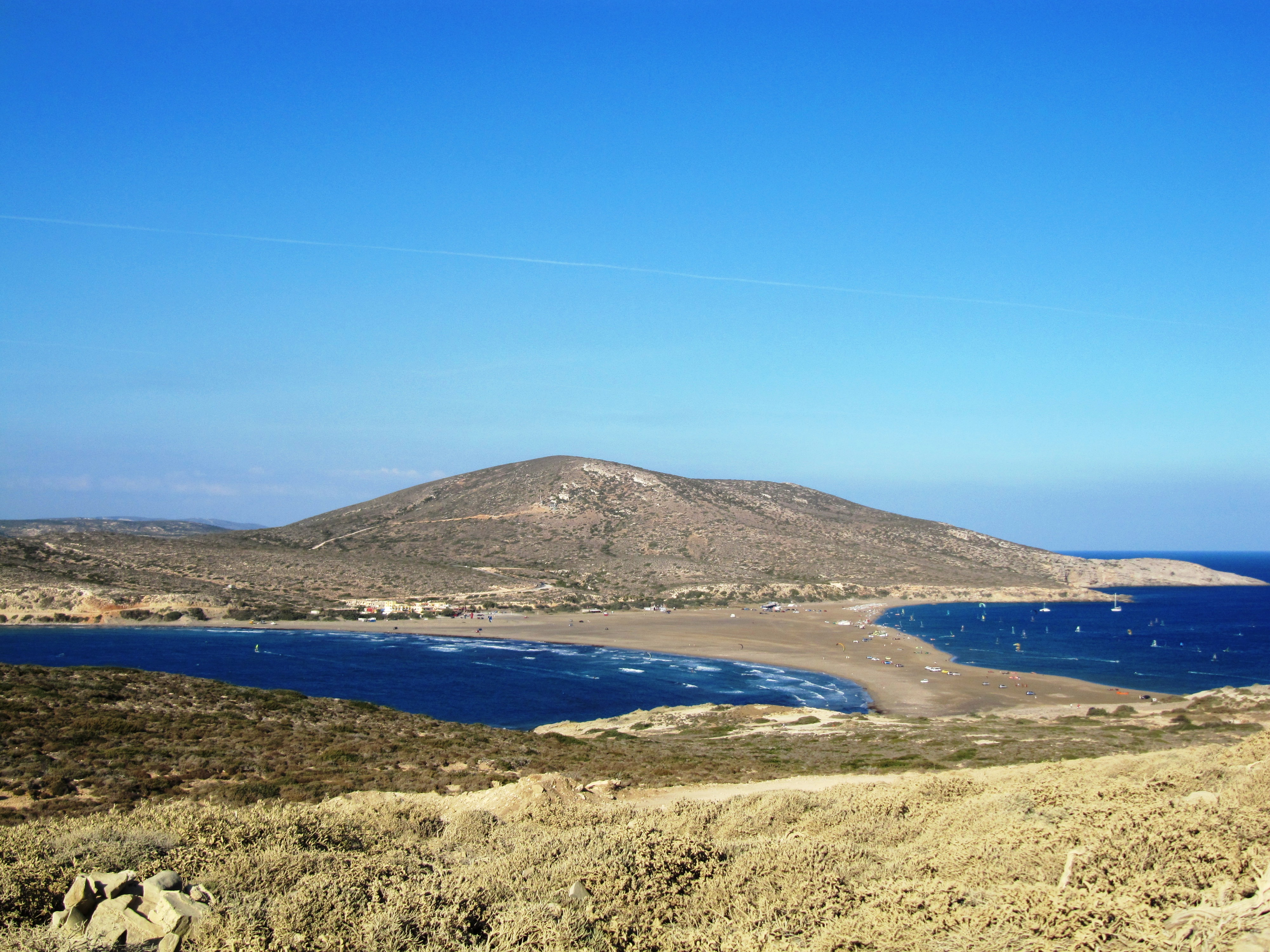 Πρασονήσι - νότια άκρη της Ρόδου